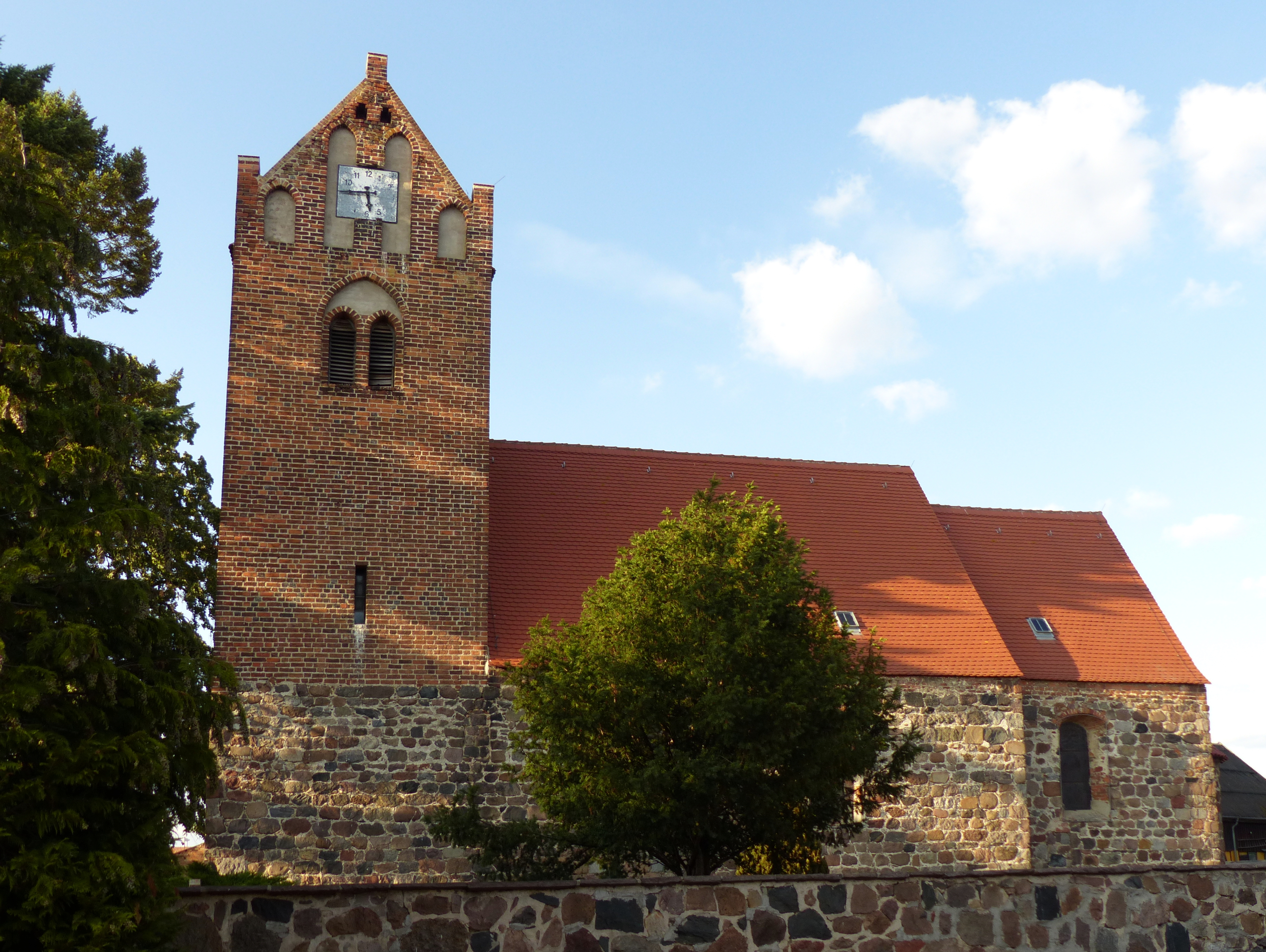 Village church of Lindtorf, municipality of Eichstedt, Landkreis Stendal, Altmark